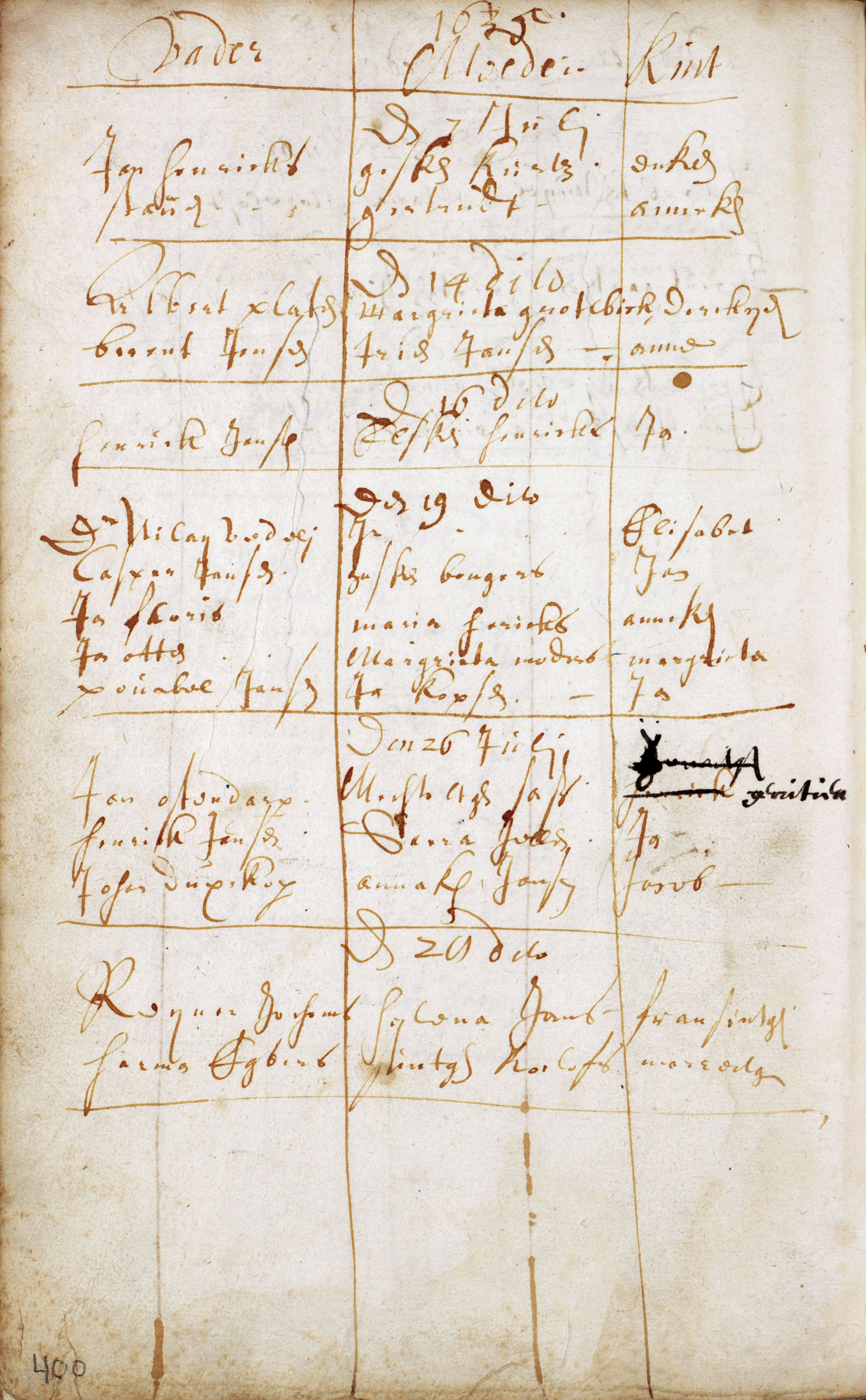 Feuille du registre de baptême de l'église protestante de Deventer sur laquelle est inscrite, à l'avant dernière ligne, la fille de Descartes (Reyner Jochems) et d'Helena Jans, Francine (Fransintge).